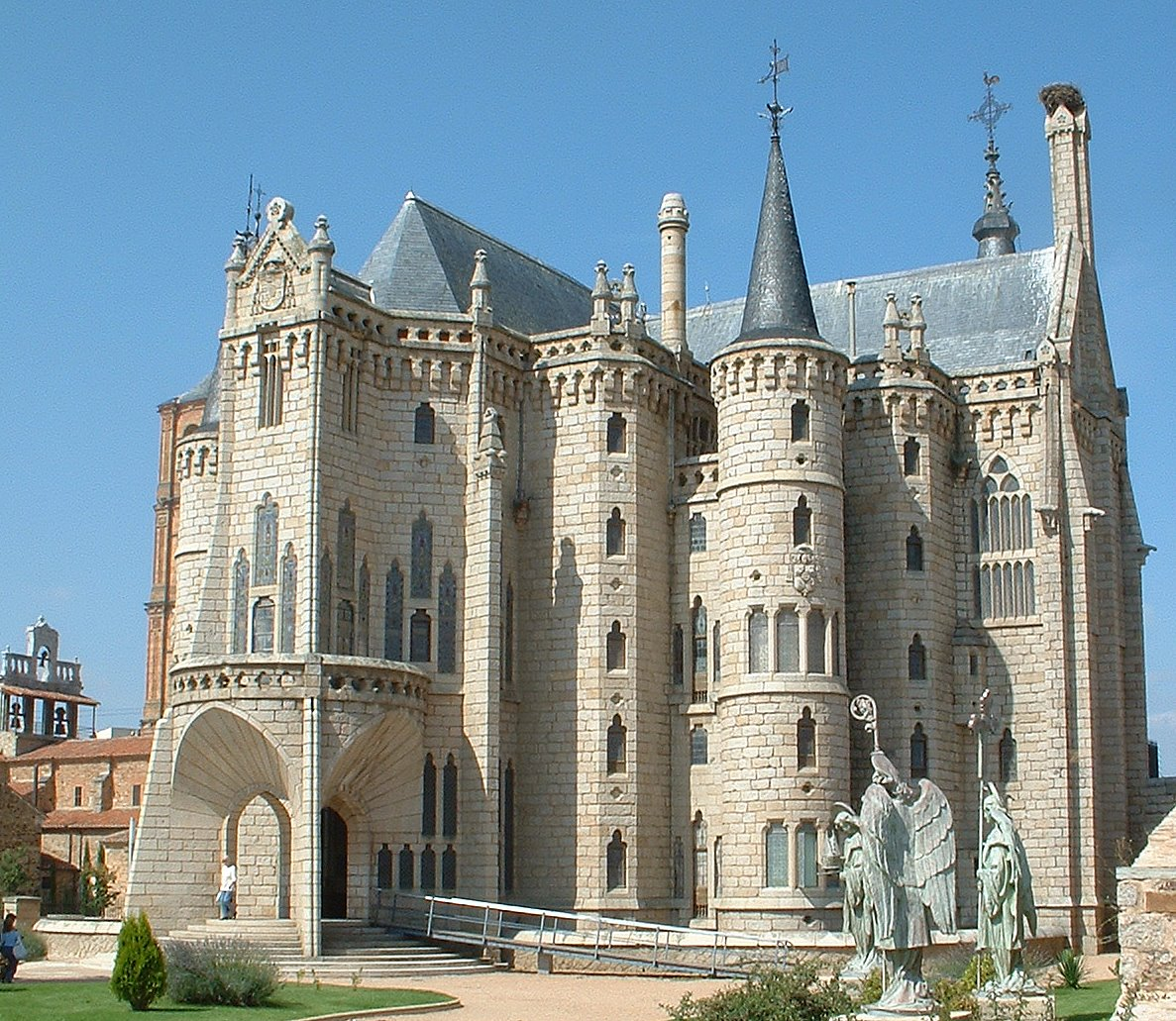 Vista general del Palacio episcopal de AstorgaEsperanto: Episkopa palaco de la hispana urbo Astorgo Palacio Episcopal de Astorga Native namePalacio Episcopal de AstorgaLocationAstorga, provincia de León, (Spain)Coordinates42° 27′ 28.08″ N, 6° 03′ 21.6″ W Established1889Web page control : Q507390 VIAF: 316732693 LCCN: sh93002330 BIC: RI-51-0003827 SUDOC: 033215227 BNF: 124104065 WorldCat institution QS:P195,Q507390